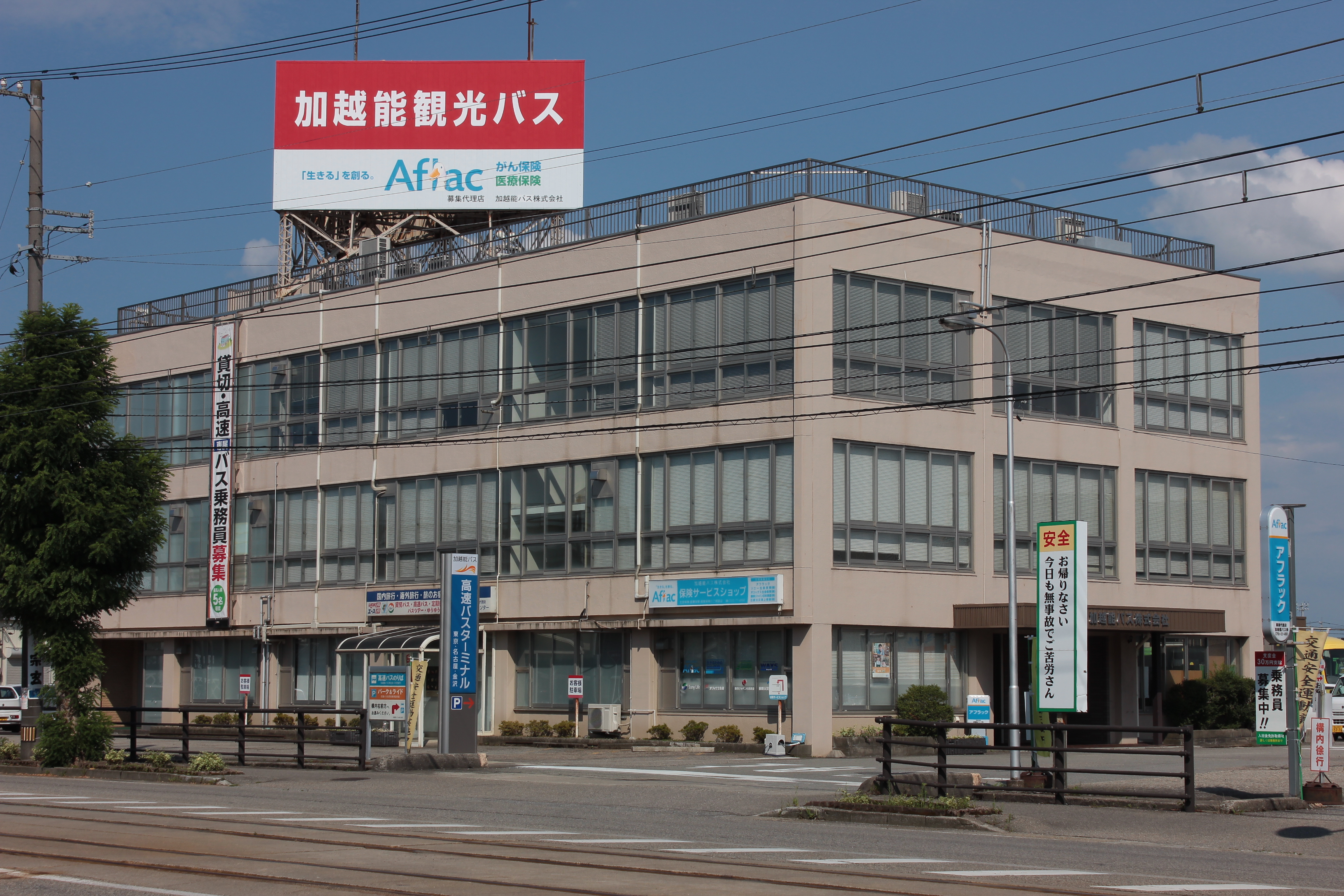 加越能バス本社（富山県高岡市） Canon EOS Kiss X5